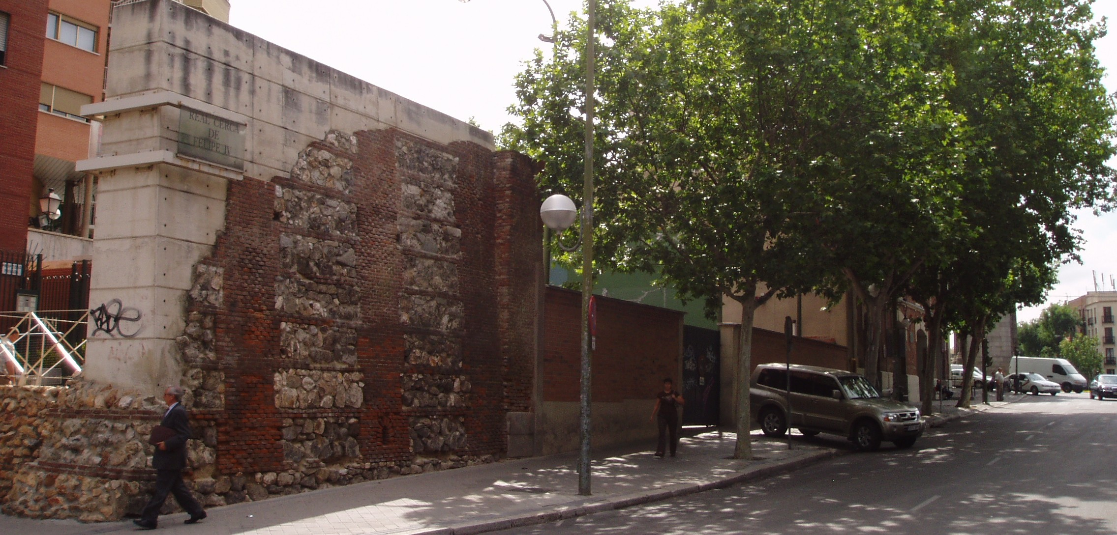 Cerca de Felipe IV del siglo XVII, Ronda de Segovia, Madrid. España.